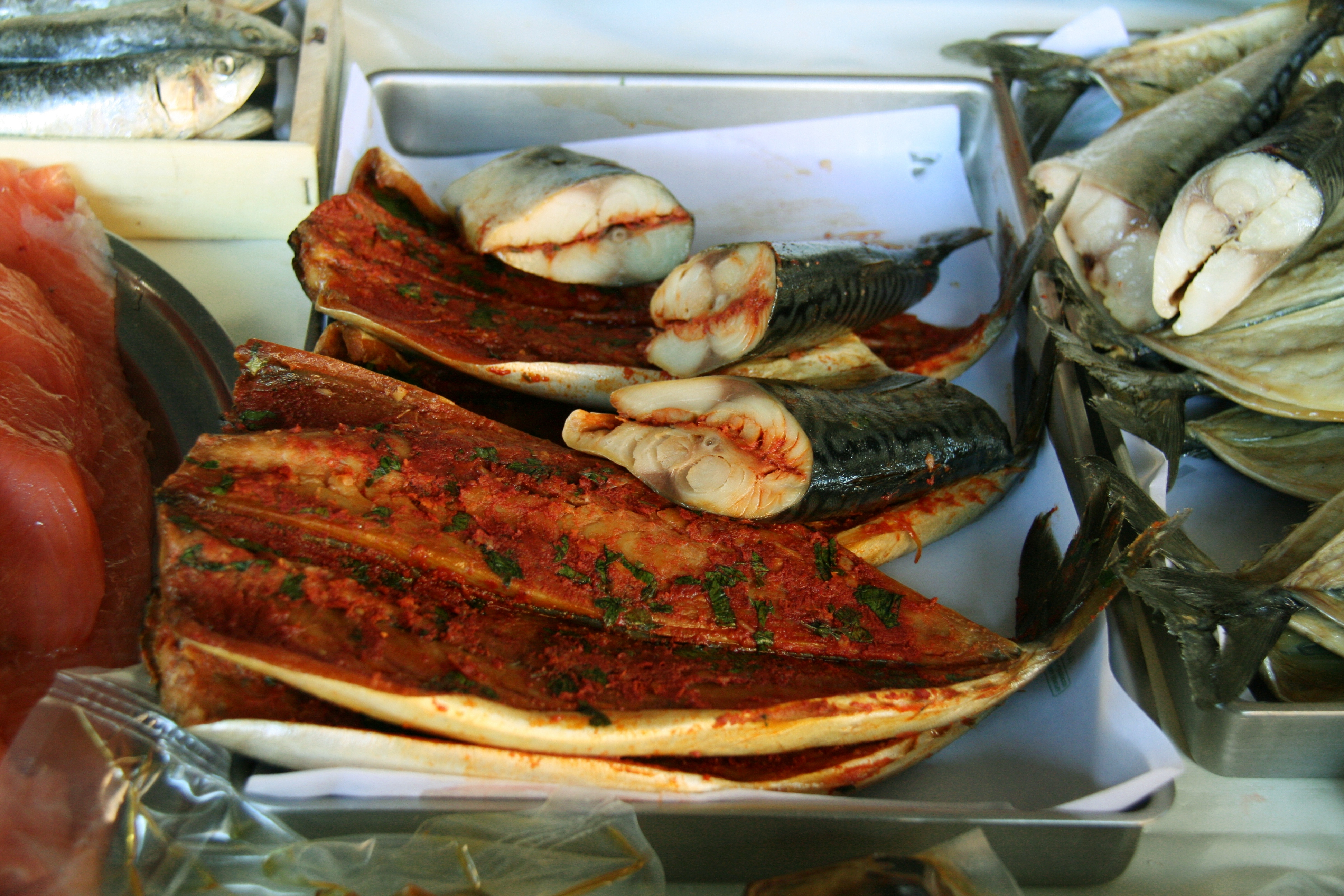 Escabeche de Caballa (Mercado de San Juan - Alicante)